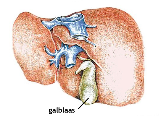 Galblaas en lever, gezien vanaf de rug